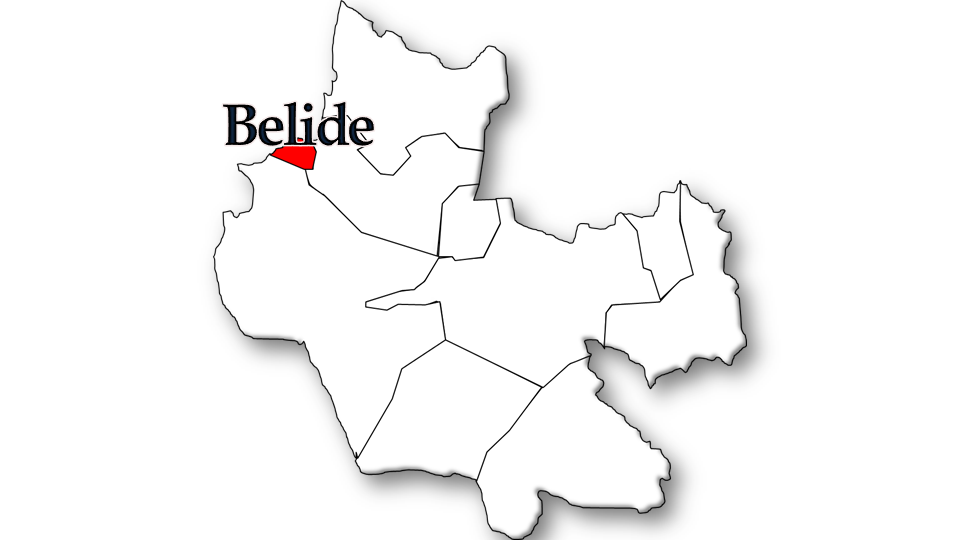 População